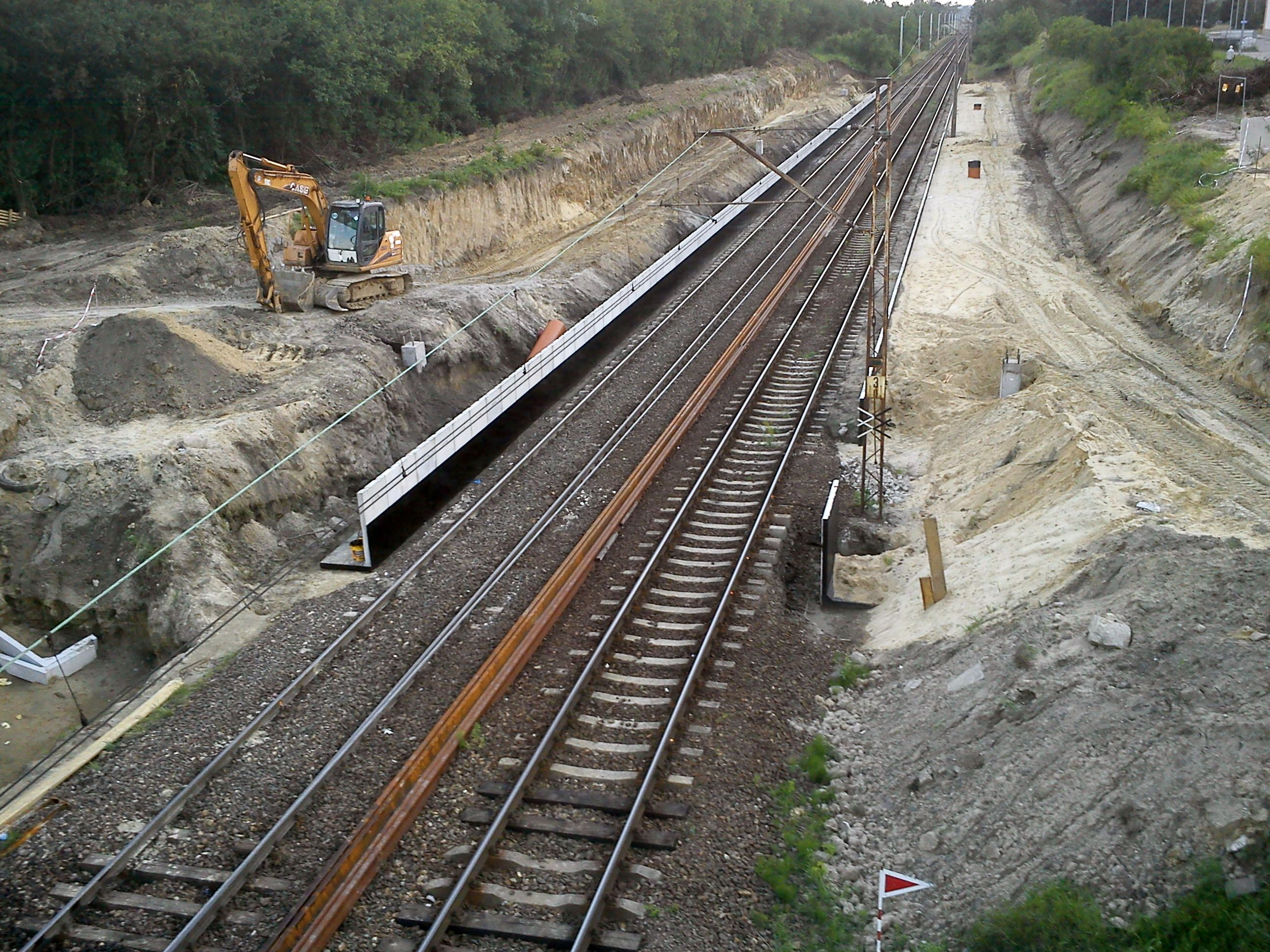 Stacja Łódź Retkinia w budowie (zdjęcie wykonane 2020.07.03).